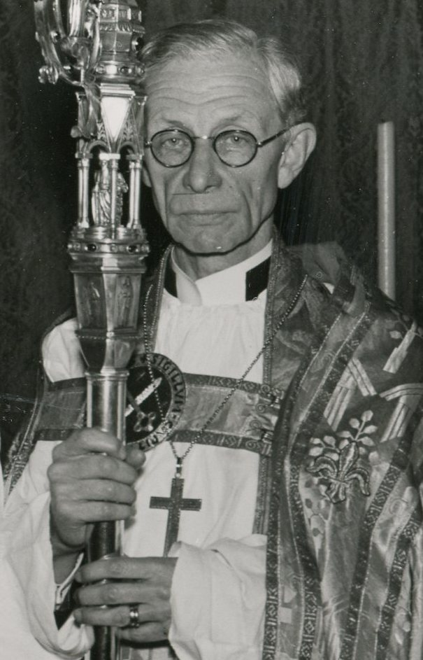 Fra en presteordinasjon i Strängnes 23. november 1944. Fra høyre: pastor Olav Fjose, biskop Aulén, pastor Ragnar Heiret. RA/PA-1209/Uc/67/1/S 5533